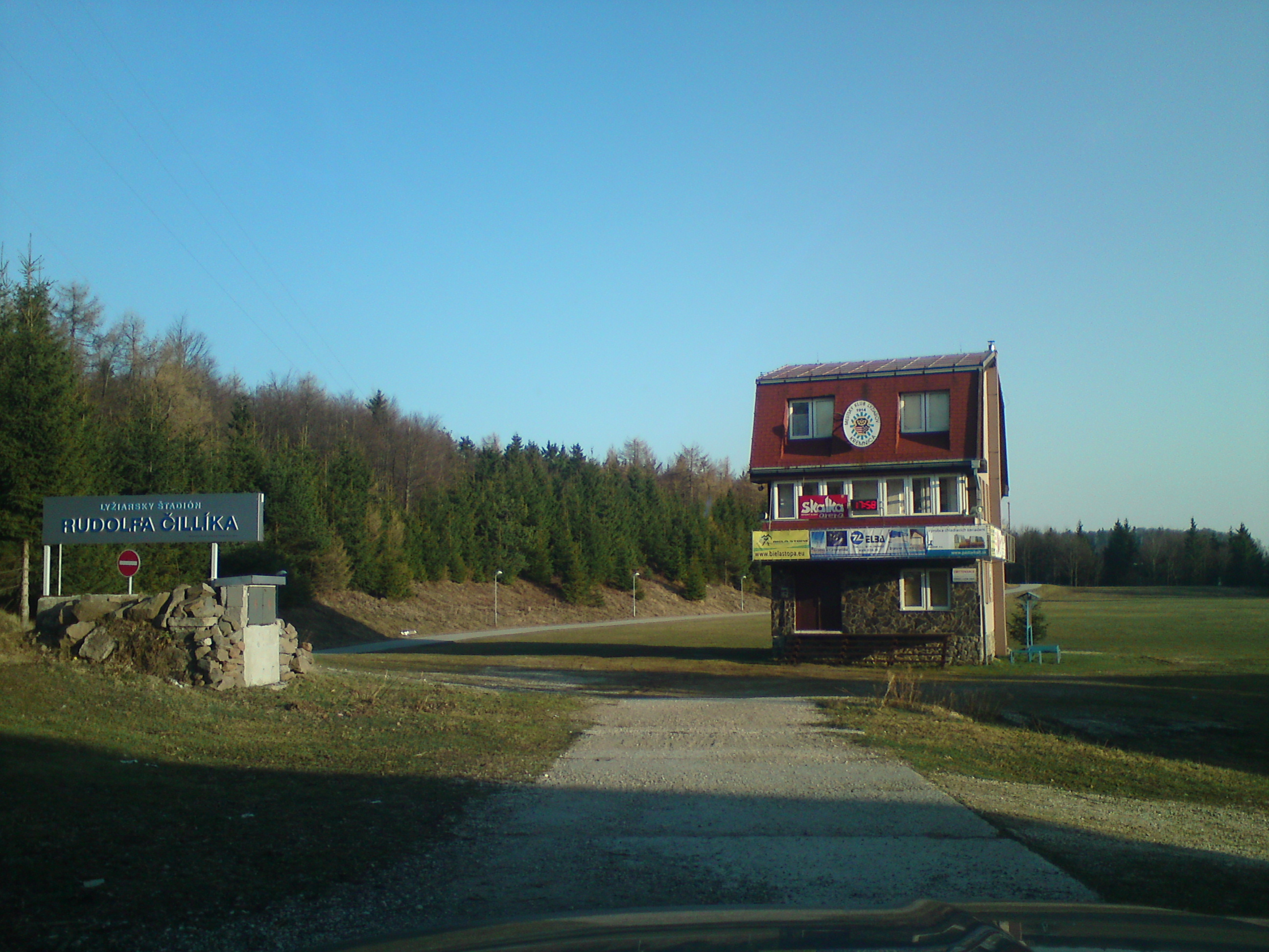 Športový areál na Skalke